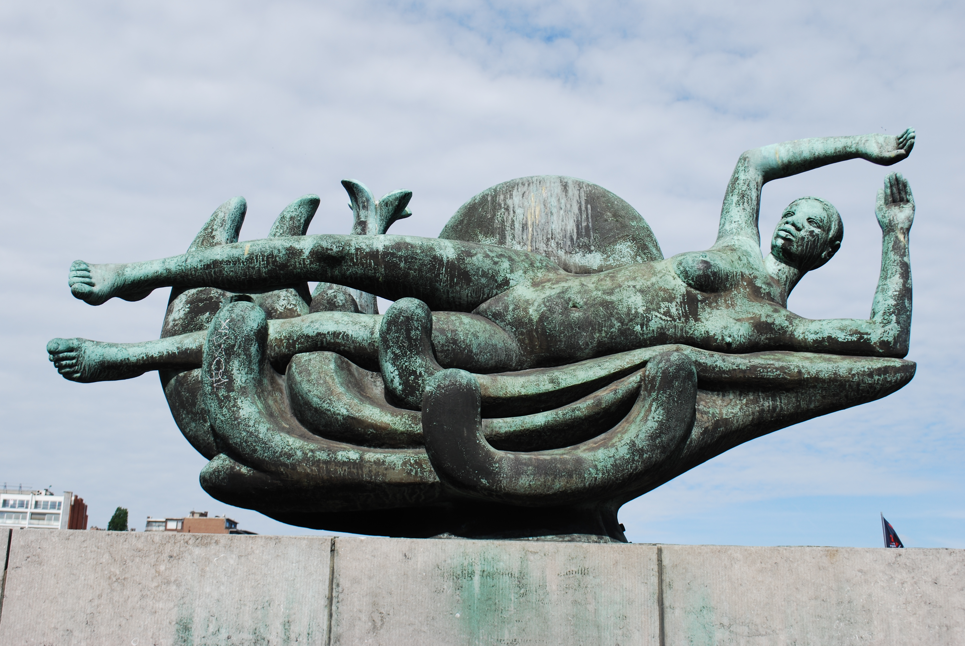 Vue des bords de Meuse à Liège, depuis la rive droite.